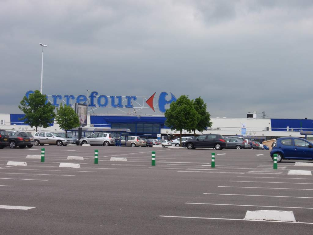 Centre Commercial Carrefour Evreux